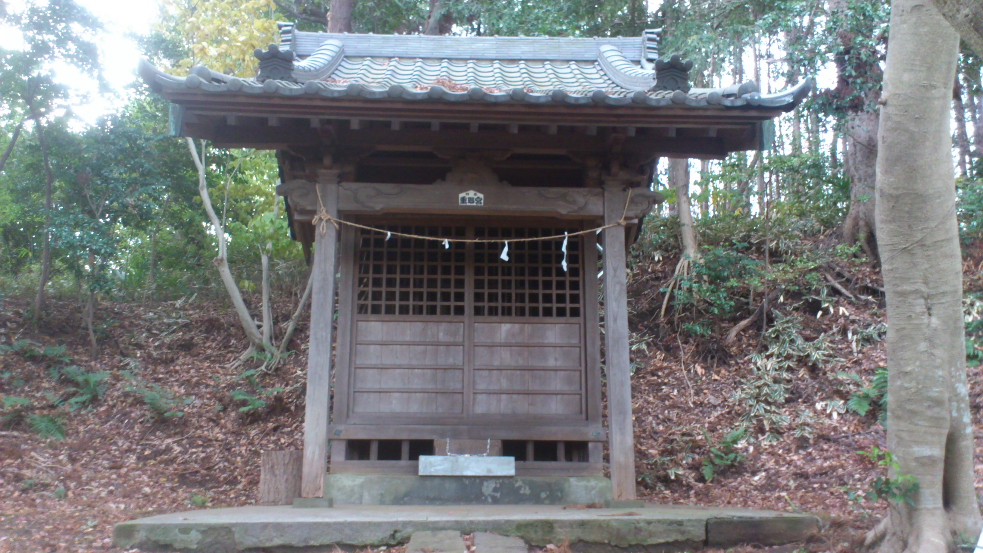 神奈川県藤沢市大庭に鎮座する熊野神社（本殿兼拝殿）。